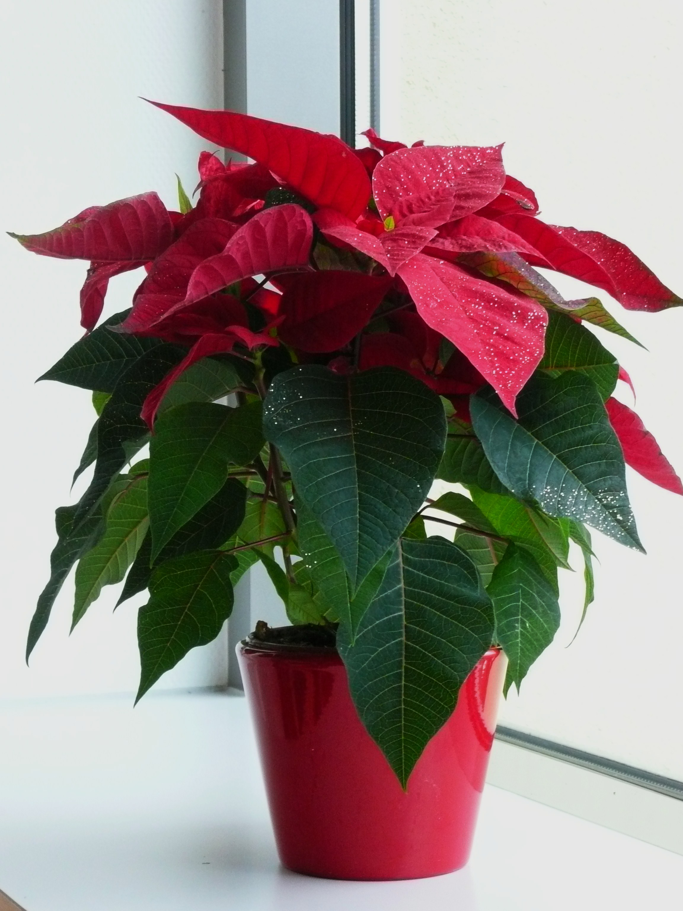 Weihnachtsstern (Euphorbia pulcherrima) als Topfpflanze, weihnachtlich dekoriert mit Glitter